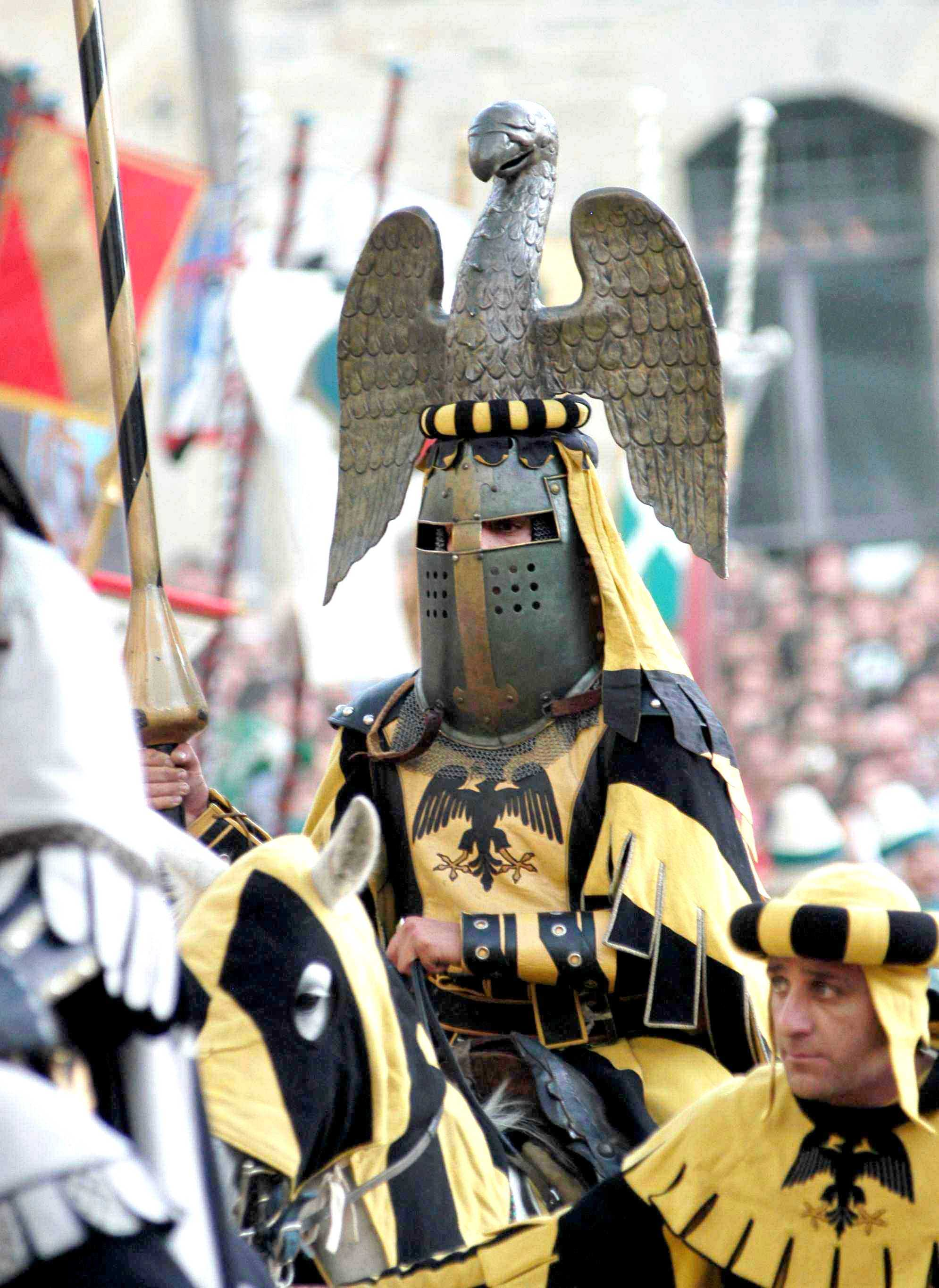 Il cavaliere dei Guillichini, nobile casata del Quartiere di Porta Sant'Andrea, durante il corteo storico della Giostra del Saracino ad Arezzo.